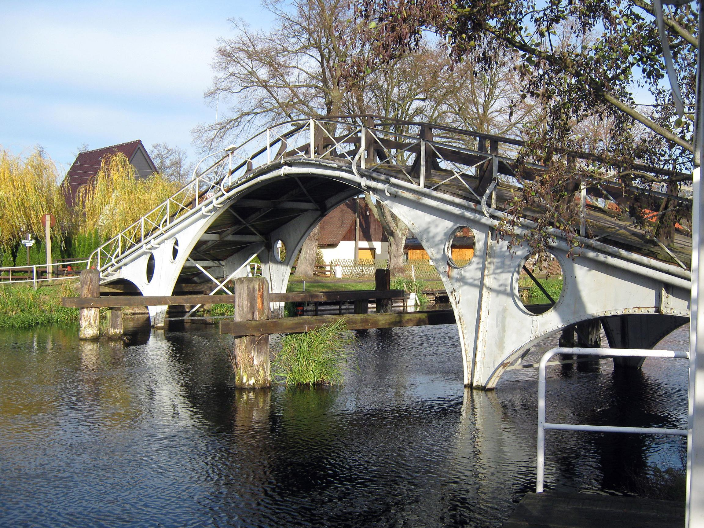 Zehdenick, vordere Kamelbrücke